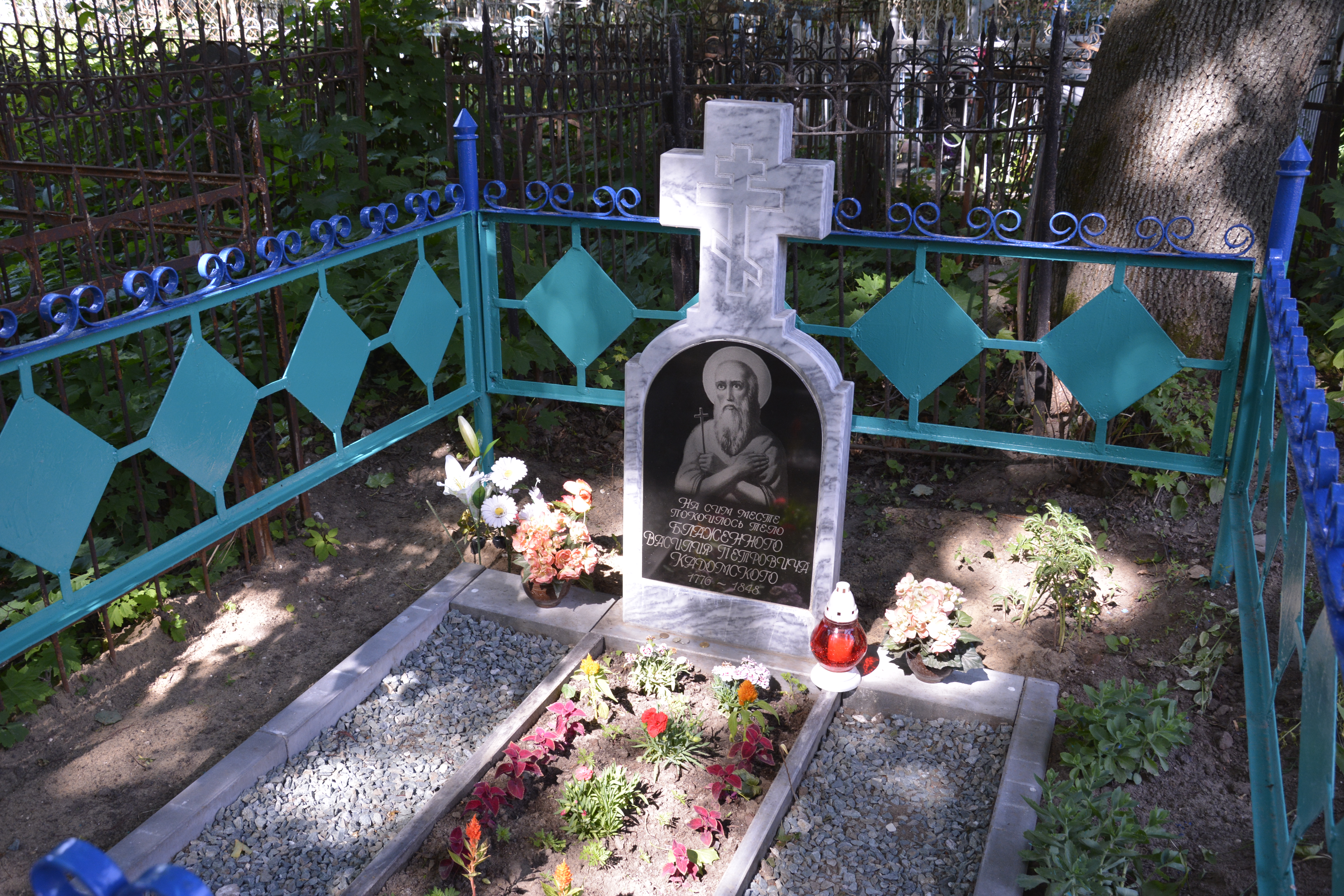 Место первоначального погребения блаженного Василия Рязанского (Кадомского) на Лазаревском кладбище г. Рязани